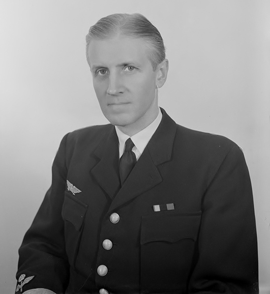 Motiv: Porträtt av Gustaf Adolf Westring, chef för F 1 Västmanlands flygflottilj 1942-1945 och Flygkrigshögskolan 1945-1947. Tillhör Gamla Malmen-samlingen. GM 1202a-GM 1202d. Ur Flygvapenmuseums bildarkiv.